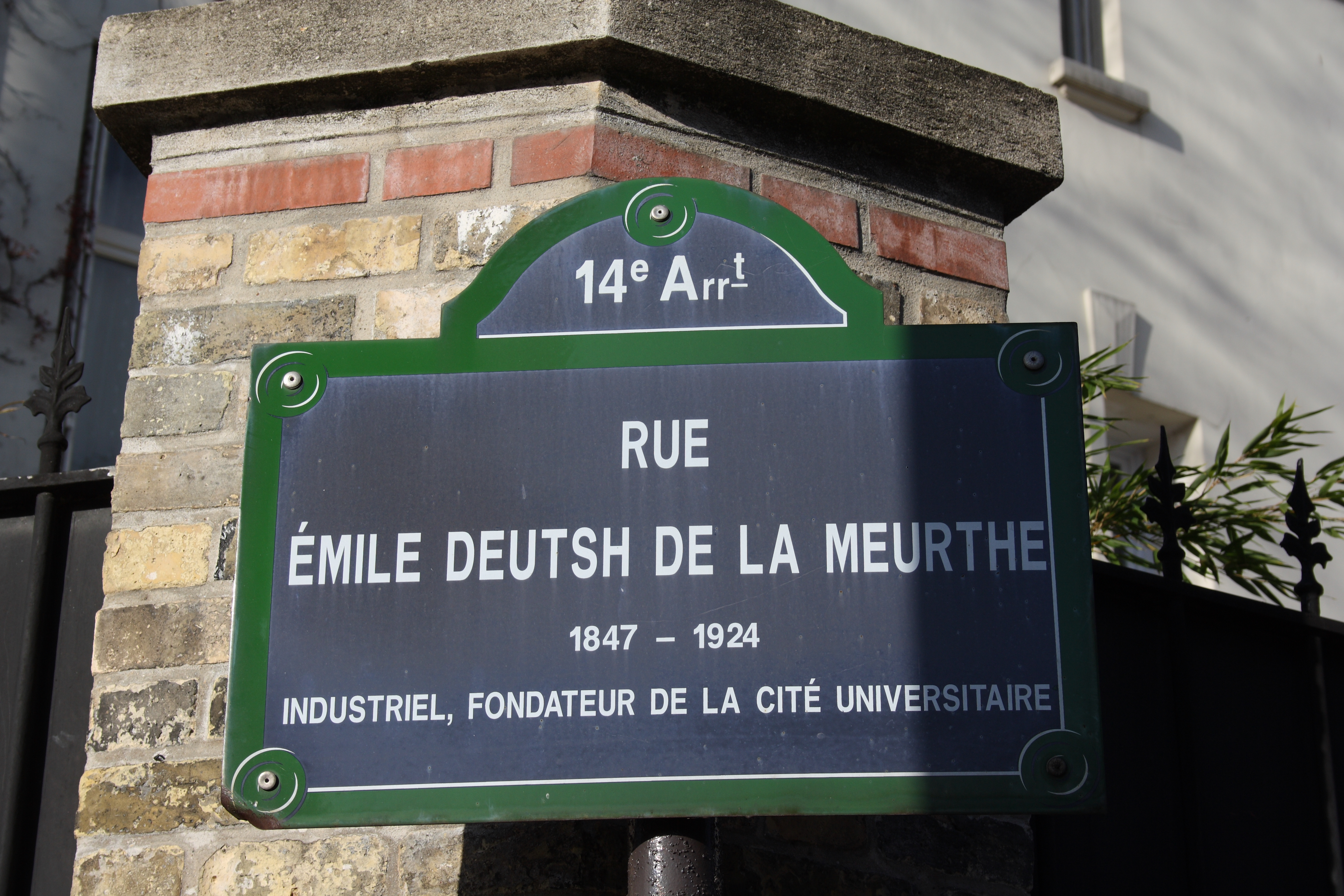 Straßenschild Émile Deutsch de la Meurthe in Paris (14. Arrondissement), falsch geschrieben!